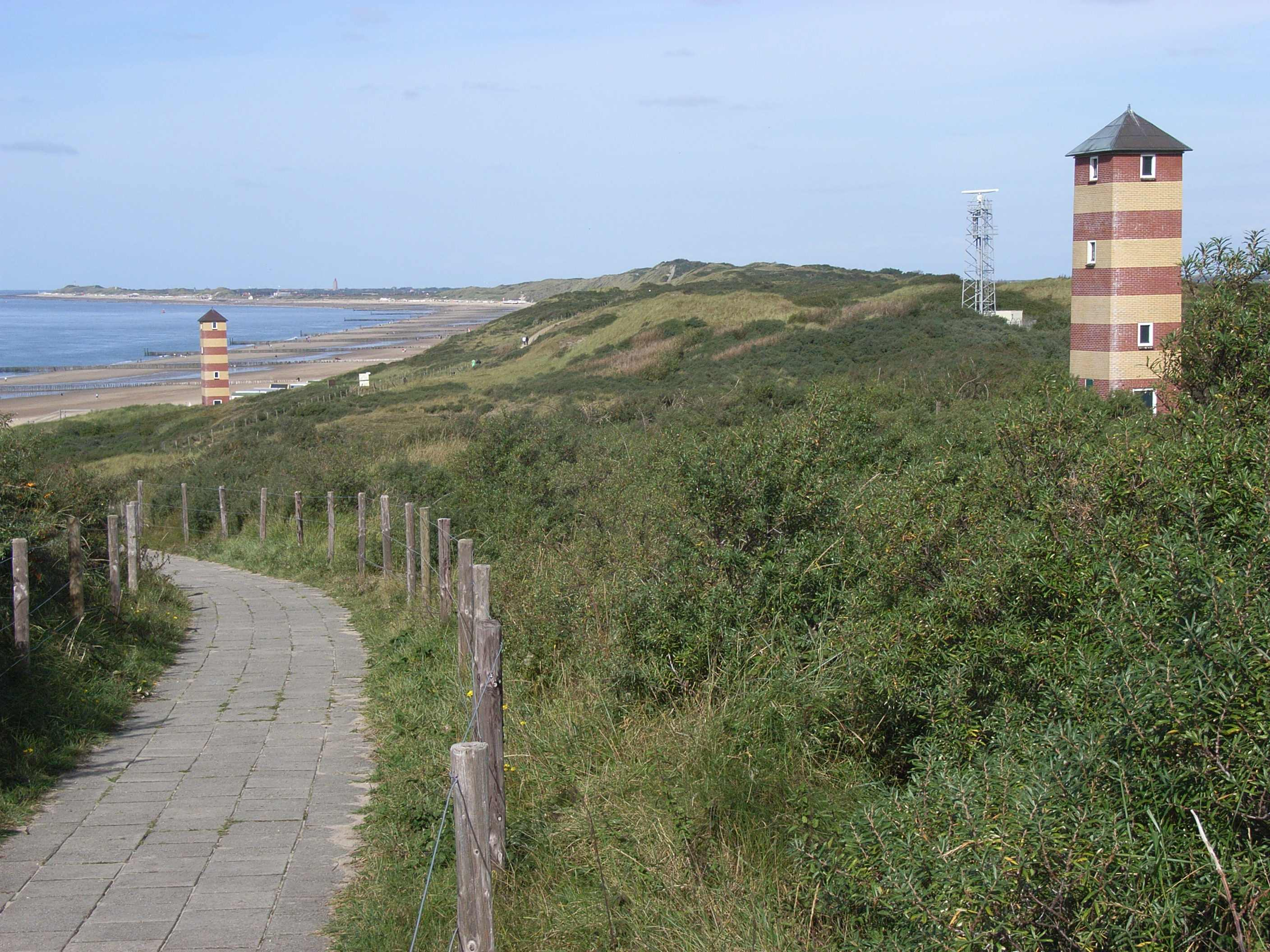 Lighthouses at Dishoek (Veere), Zeeland, NL